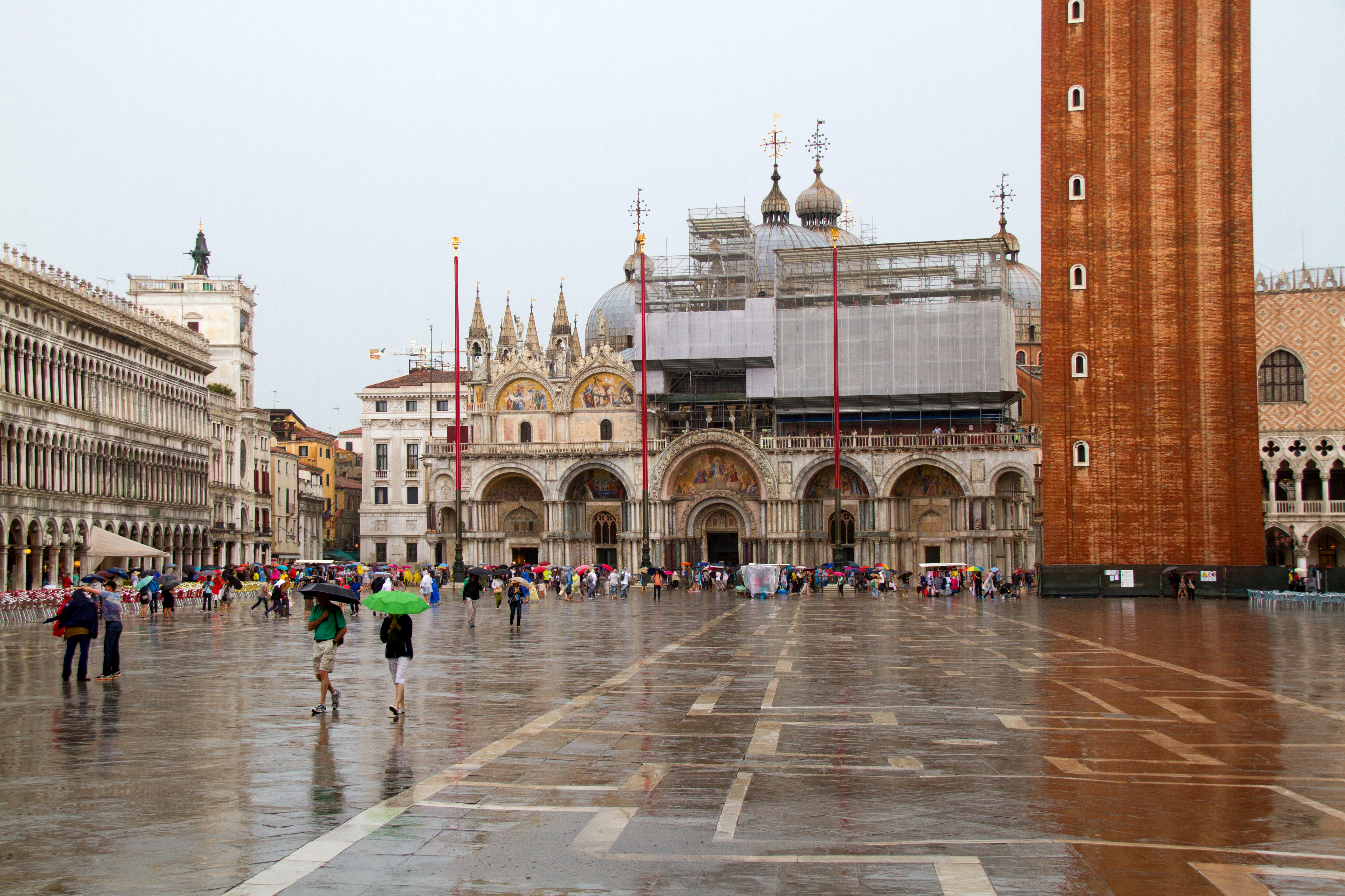 Venice 7